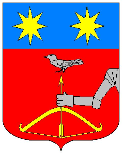 Grb obitelji Garajin